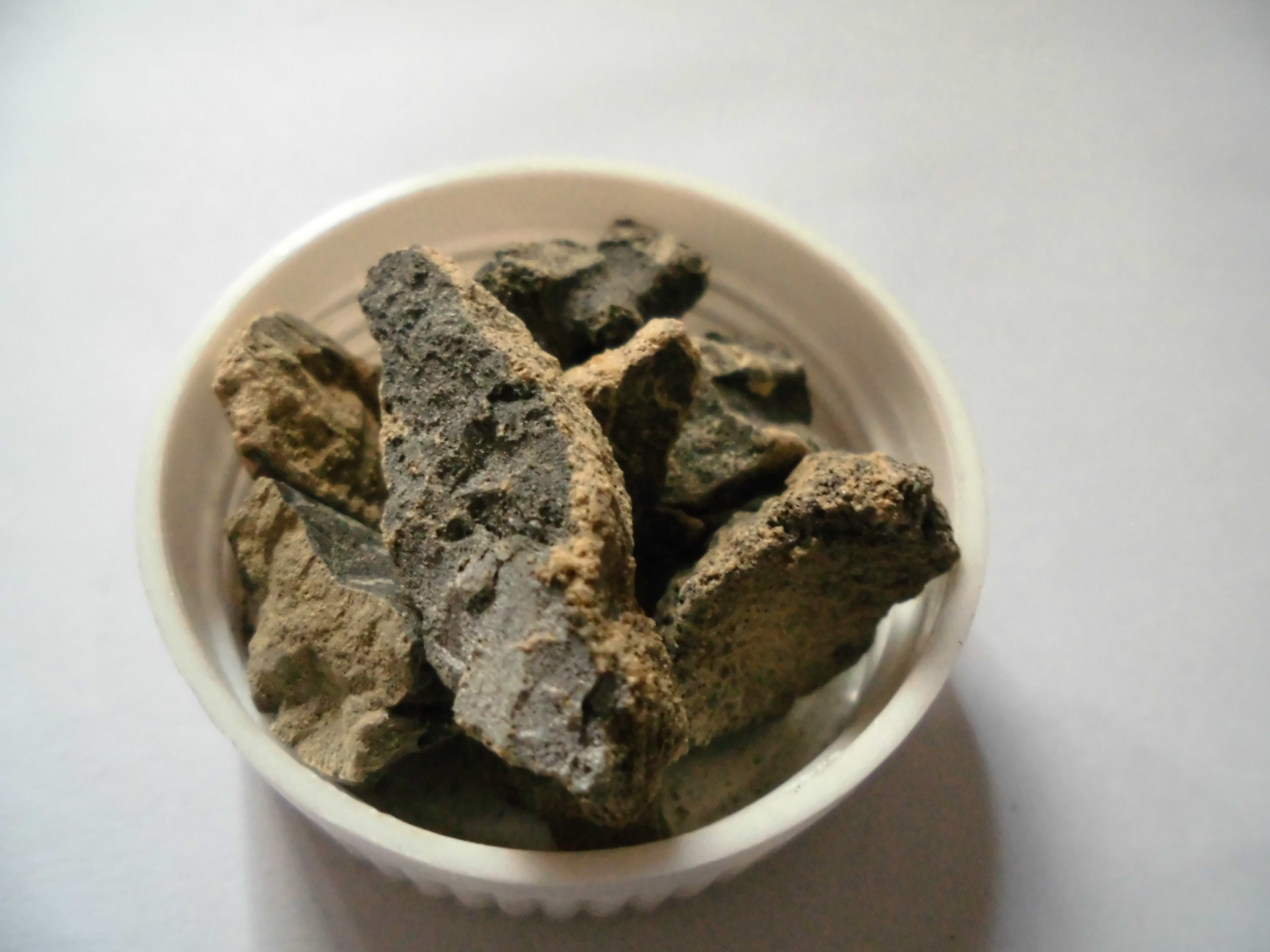 碳化钙（又名电石，diànshí），CaC2